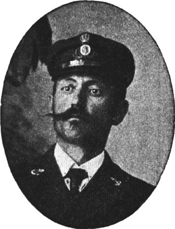 griechischer Sportler, Athen, 19. Jahrhundert